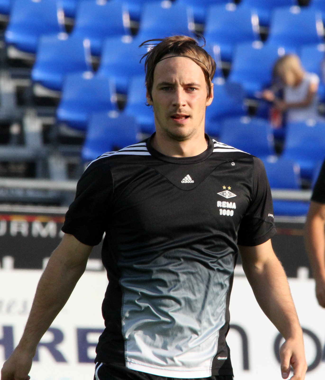 Mike Jensen på Sandnes stadion 25. august 2013